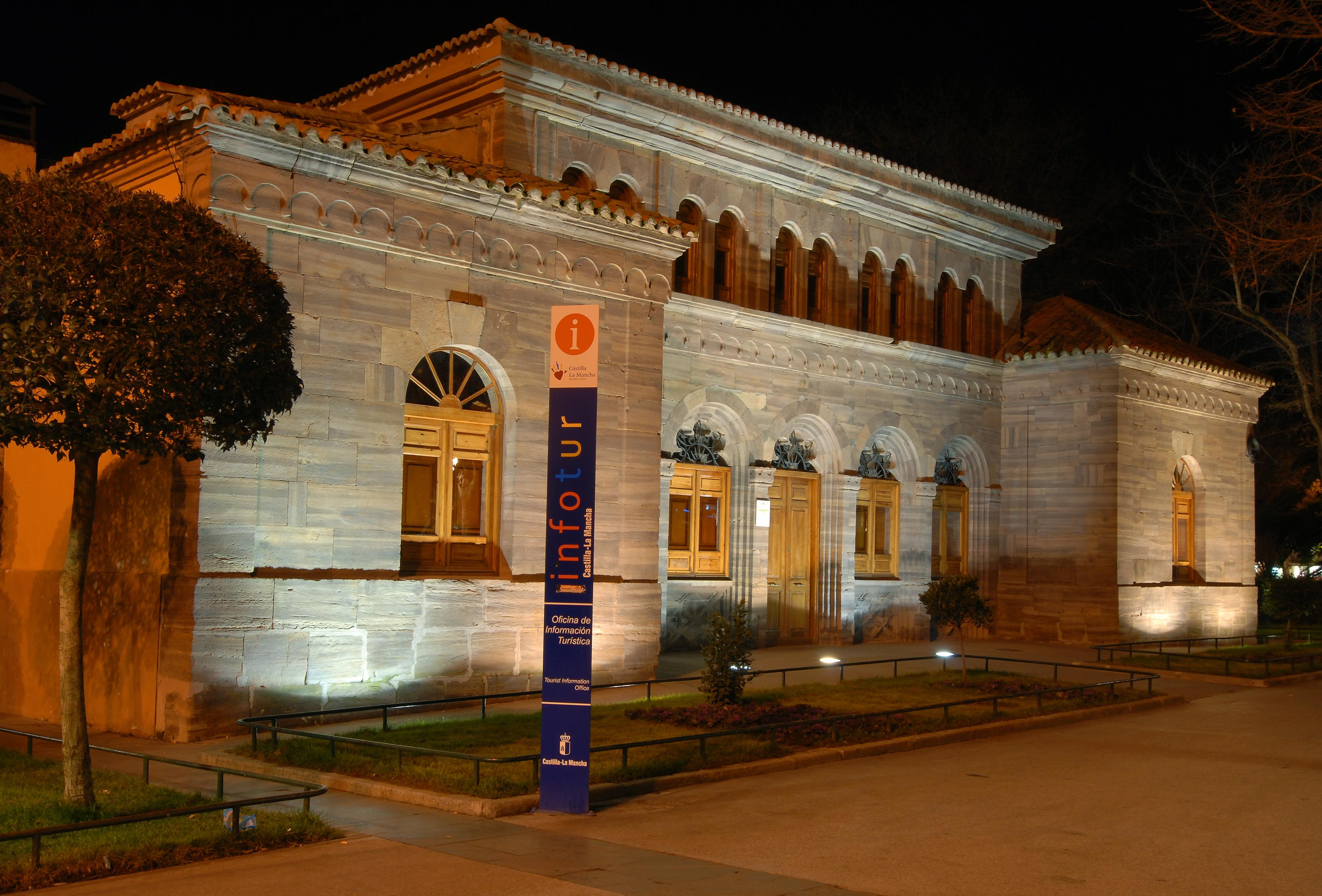 Fachada Balneario de agua agria Casa de Baños de Puertollano